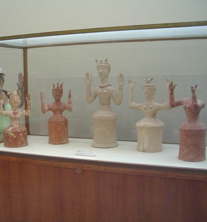 Museu arqueològic de Creta a Heràkleion, foto feta per J. Ollé el 6 d'agost del 2005.